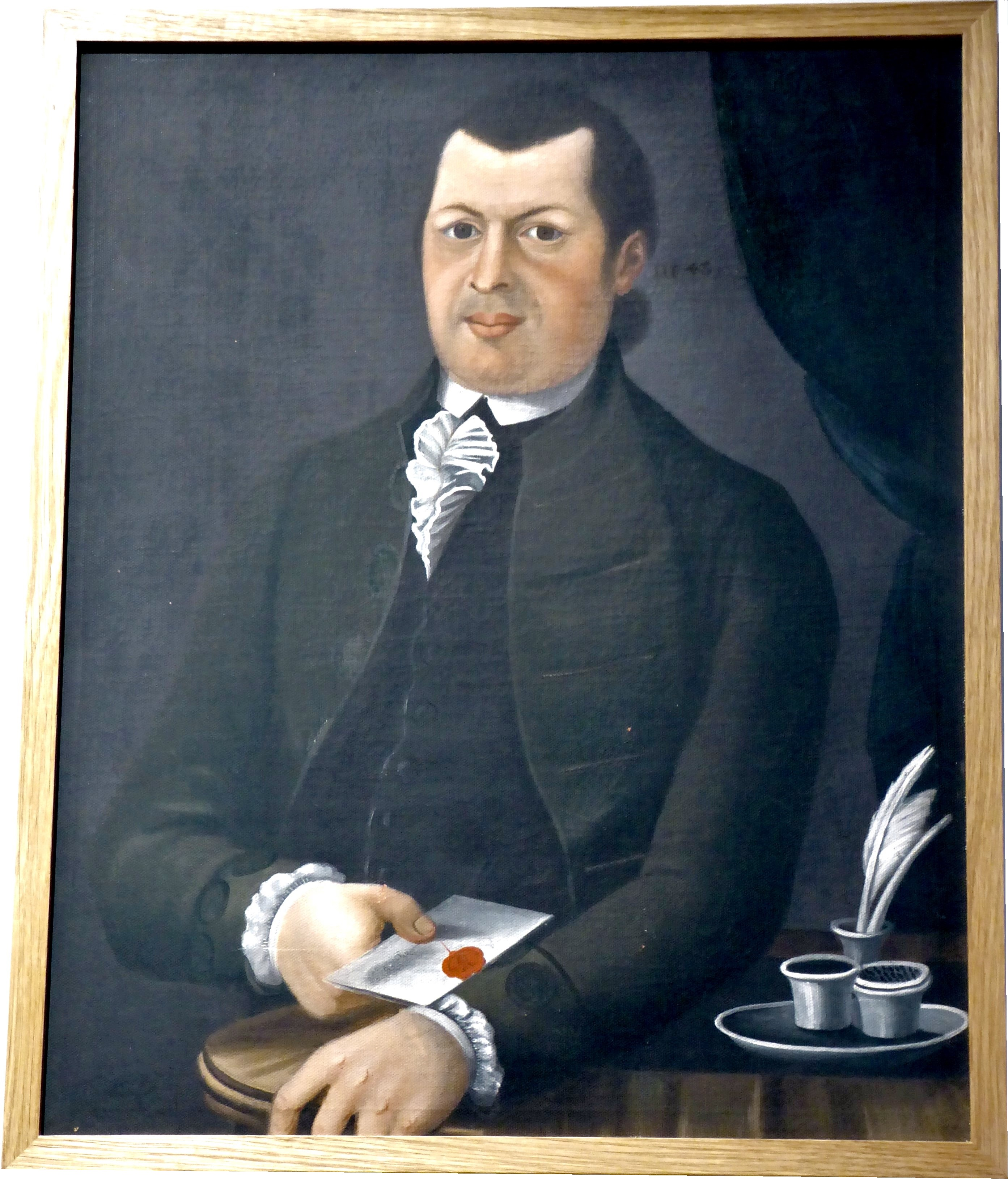 Portrait des Orgelbauer Joseph Loser von einem unbekannten Malerdf